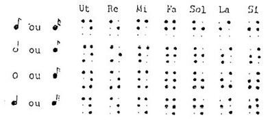 Cuadro de las nota y los valores en el sistema braille. Los signos de la primera linea también aparecen en las siguientes, no obstante se añaden puntos suplementarios para indicar los cambios de valor.